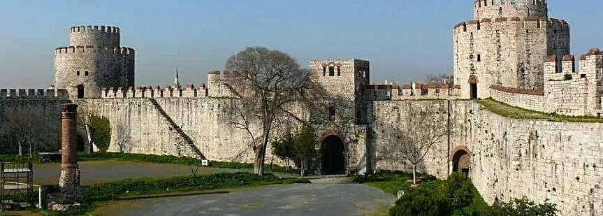 Фортеця Едікуле в Станбулі